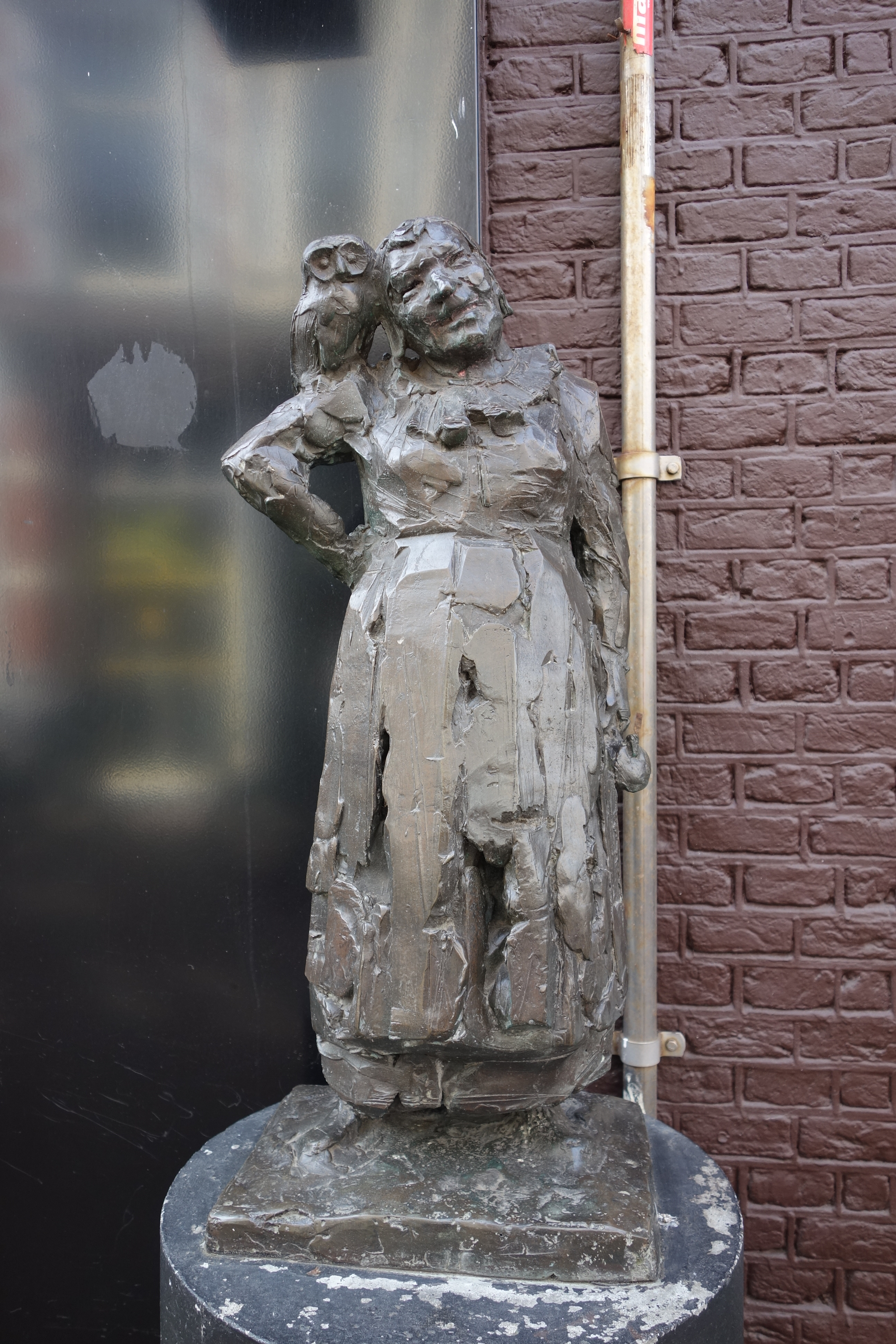 Beeldje van Malle Babbe door Kees Verkade in de Barteljorisstraat in Haarlem.